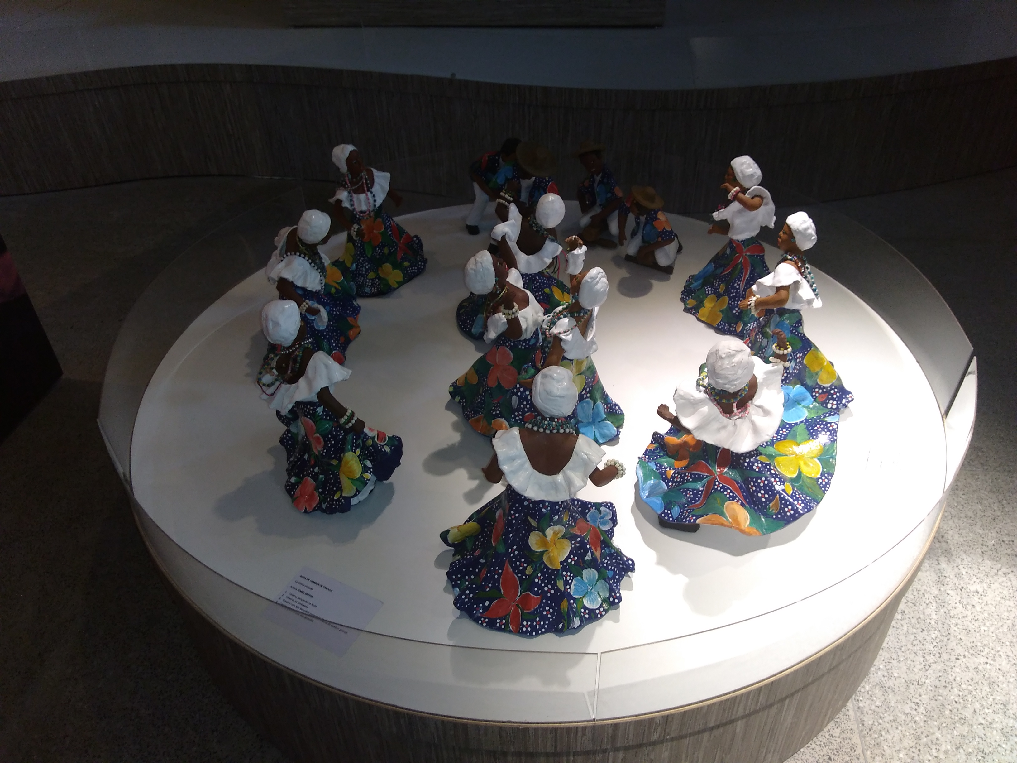 Parte exterior e exposições da Casa do Tambor de Crioula, espaço cultural destinado à preservação memória das manifestações populares de origem afro-brasileiras da cidade São Luís, MA